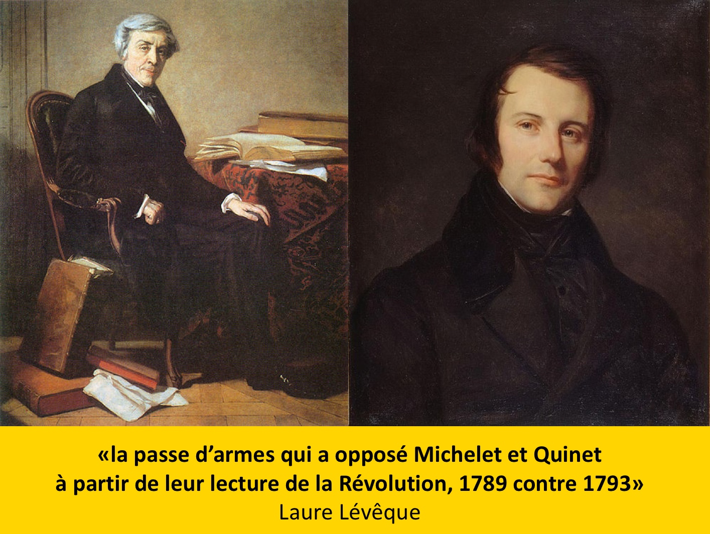 Fichier Michelet : File:Jules Michelet.jpg Fichier Quinet : File:Edgar Quinet - Sébastien Melchior Cornu.jpg